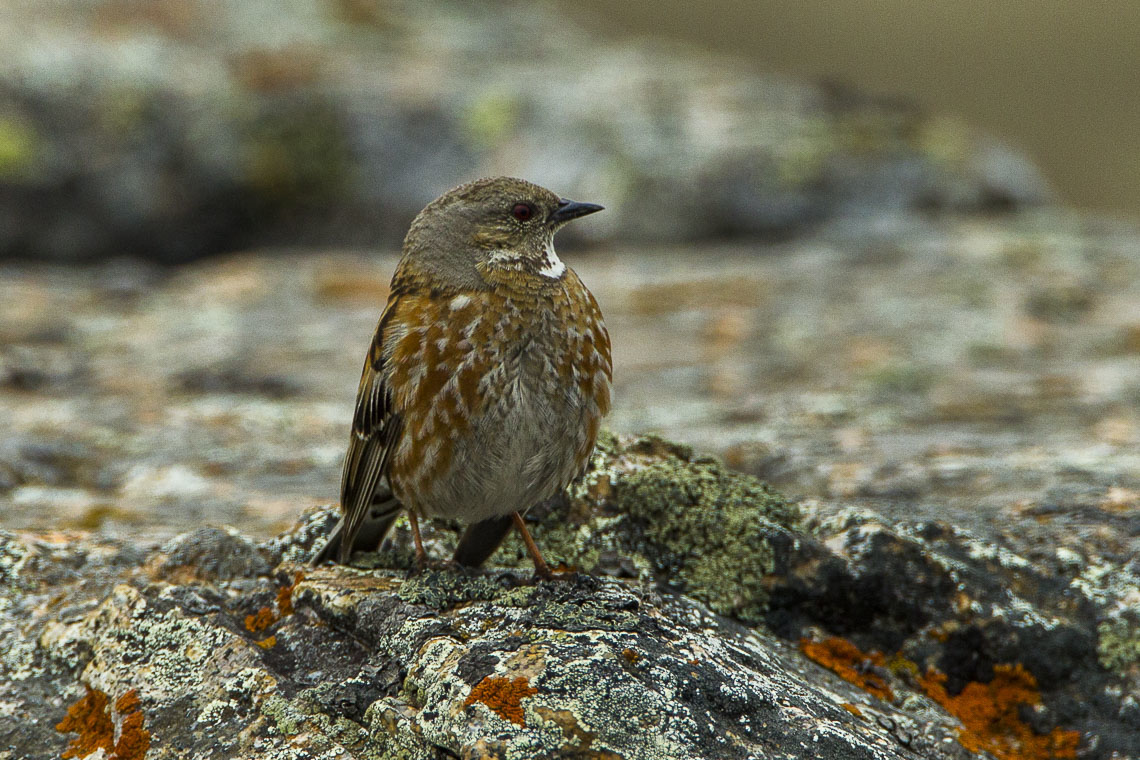 Altai Accentor - Kazakistan_S4E4375